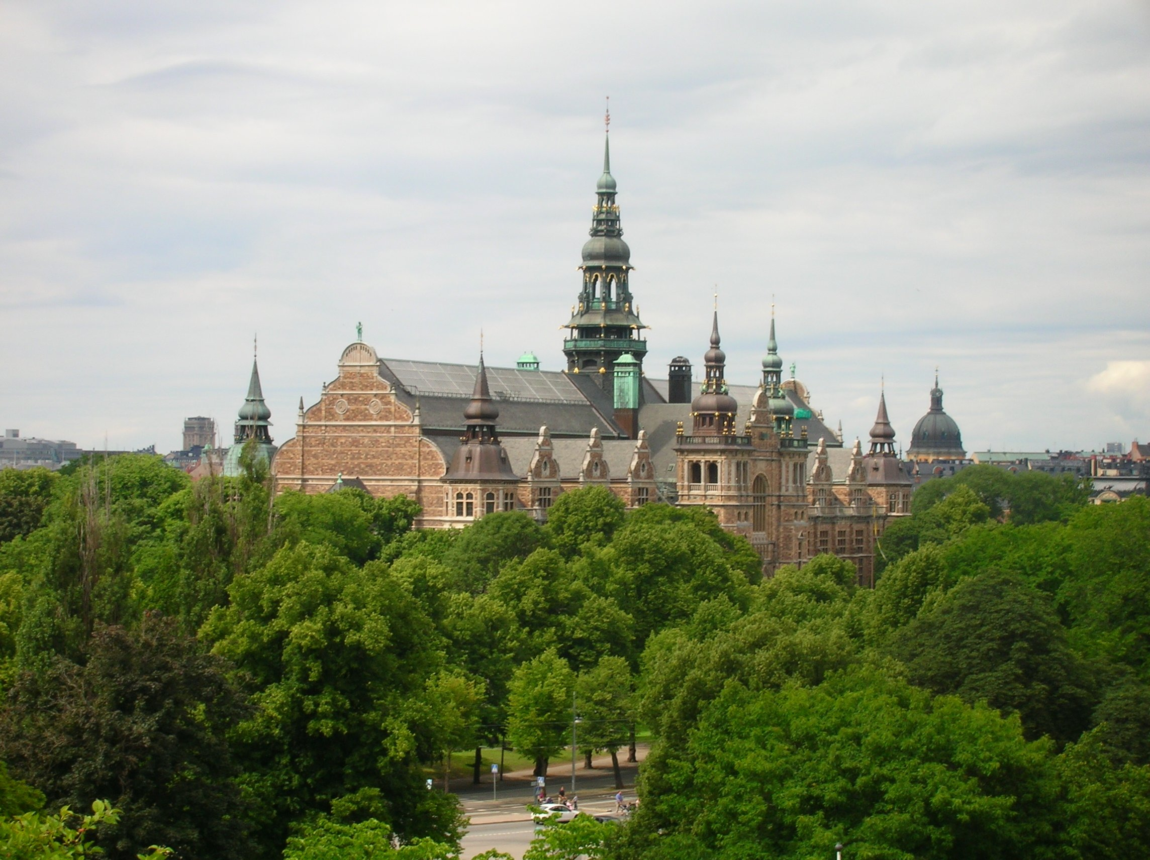 Nordiska museet, Stockholm, Sweden.